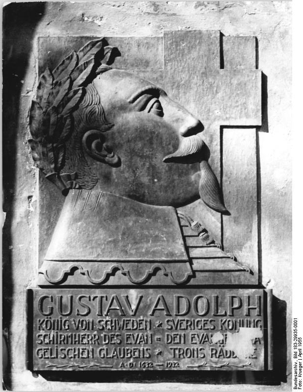 Greifswald, Gedenktafel für Gustav Adolf Zentralbild Krueger 4 Motive 15.4.1955 Greifswald Gedenkrelief für König Gustav-Adolf von Schweden im Dom in Greifswald.